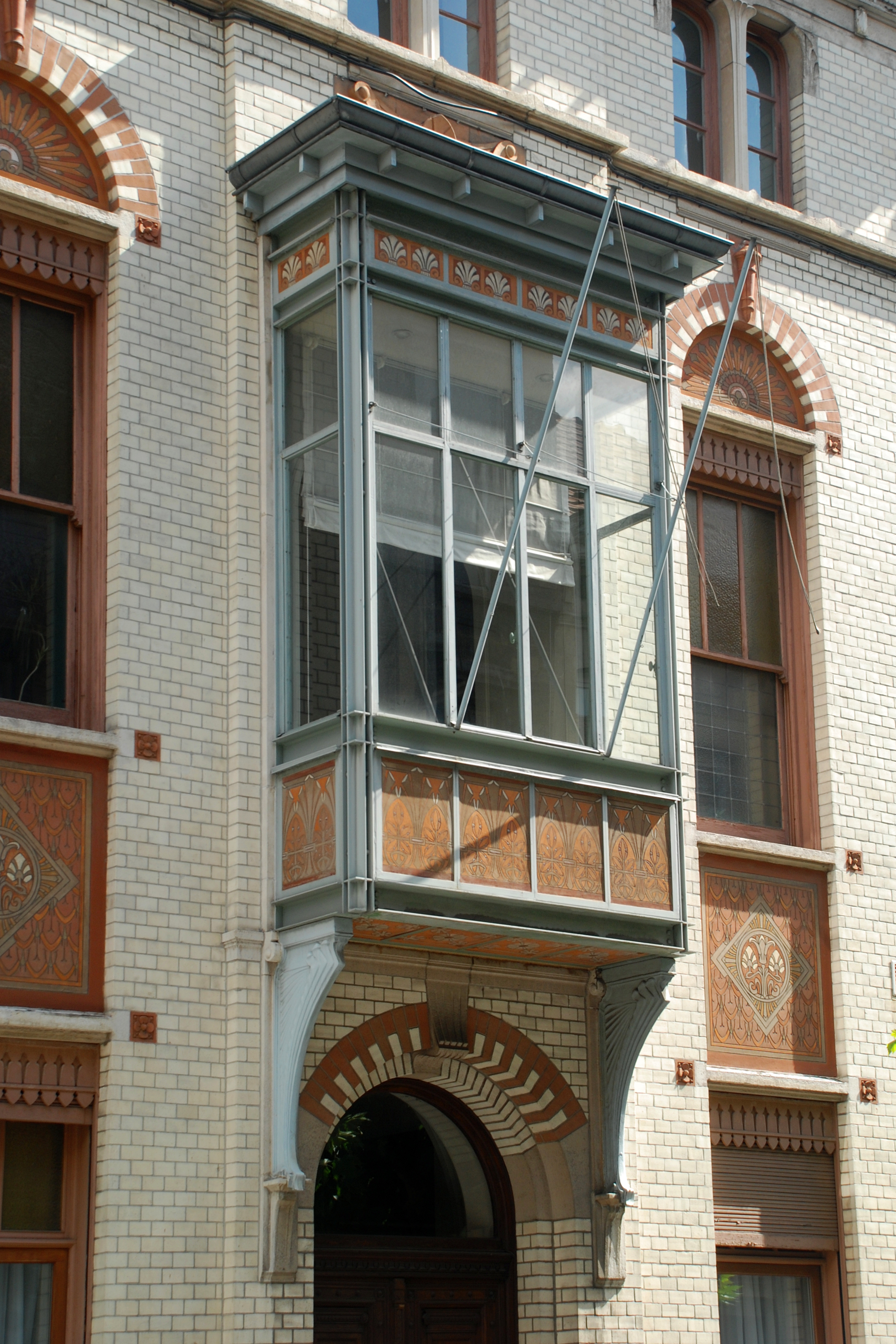 Belgique - Bruxelles - Maison Govaerts